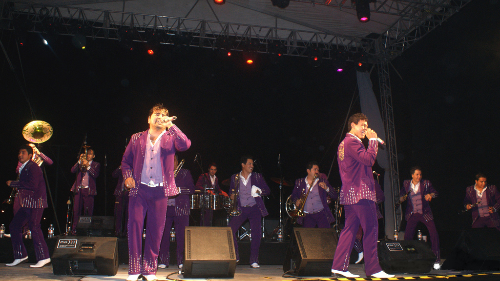 El Recodo en Cancún, 10 de Julio del 2009, organizado por Medek Entertainment.